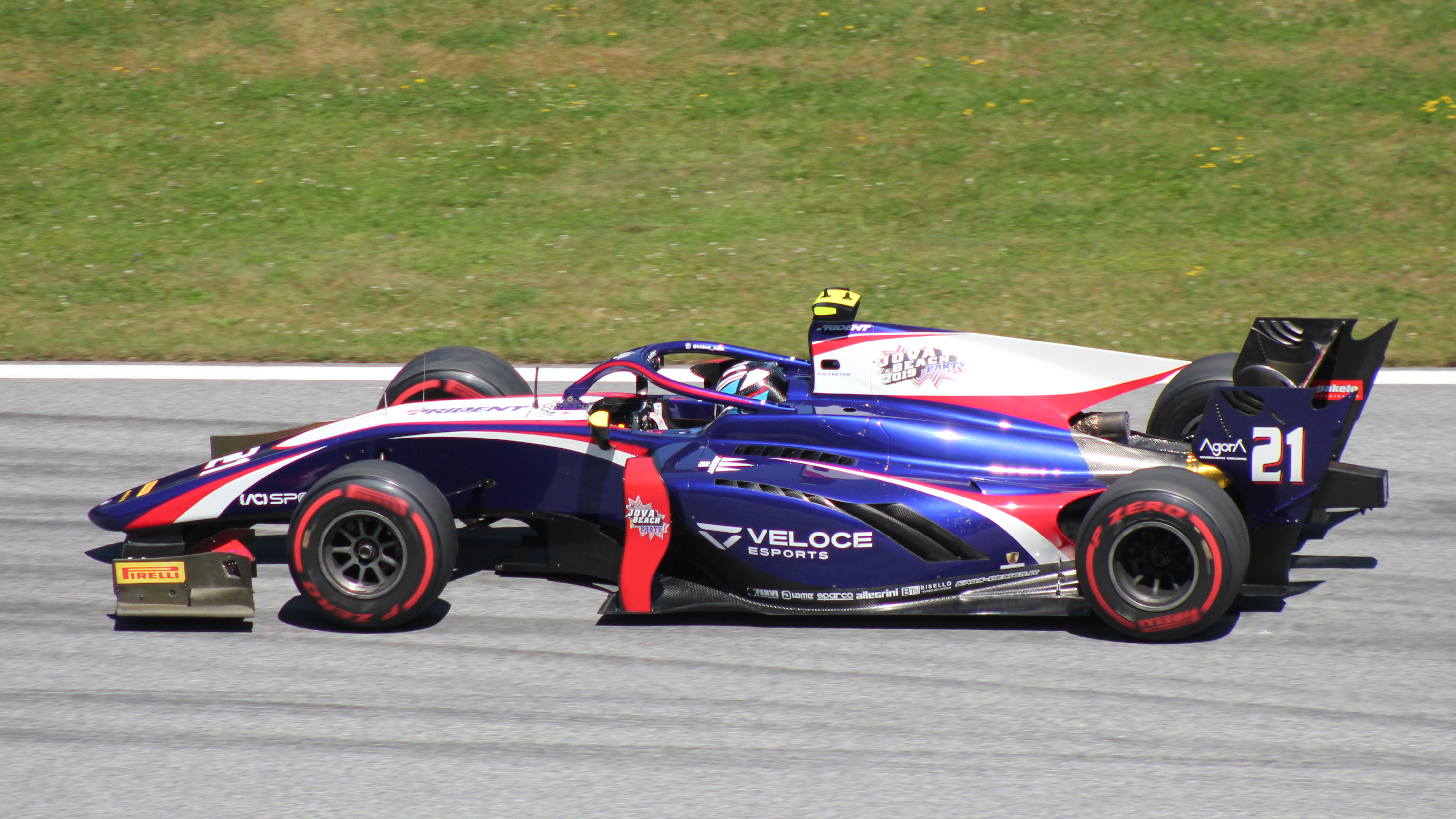 Tveter beim Rennwochenende in Österreich 2019